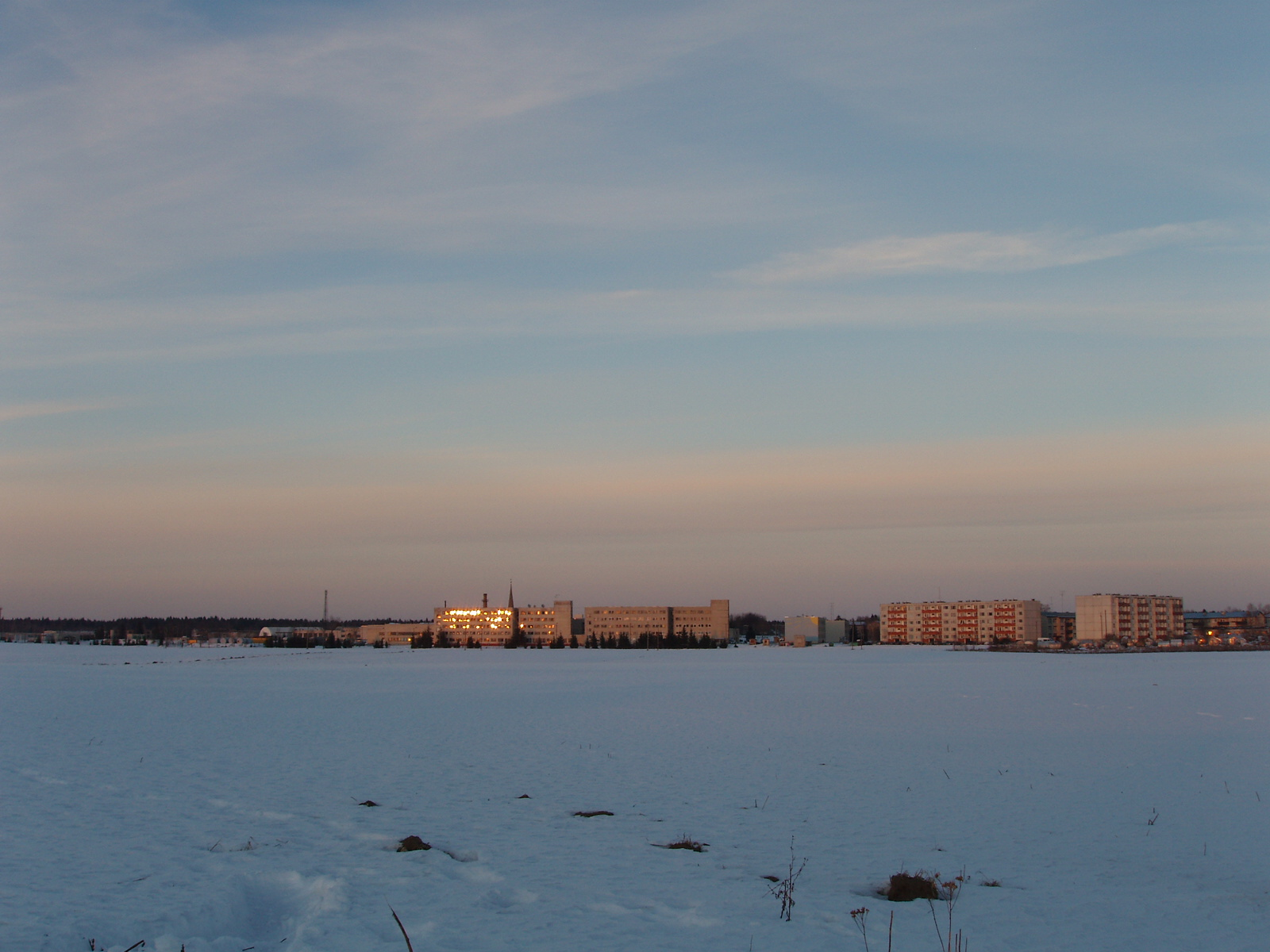 Kose alevik, Kose vald, Harjumaa.